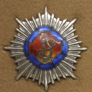 Odznaka 1 pszw